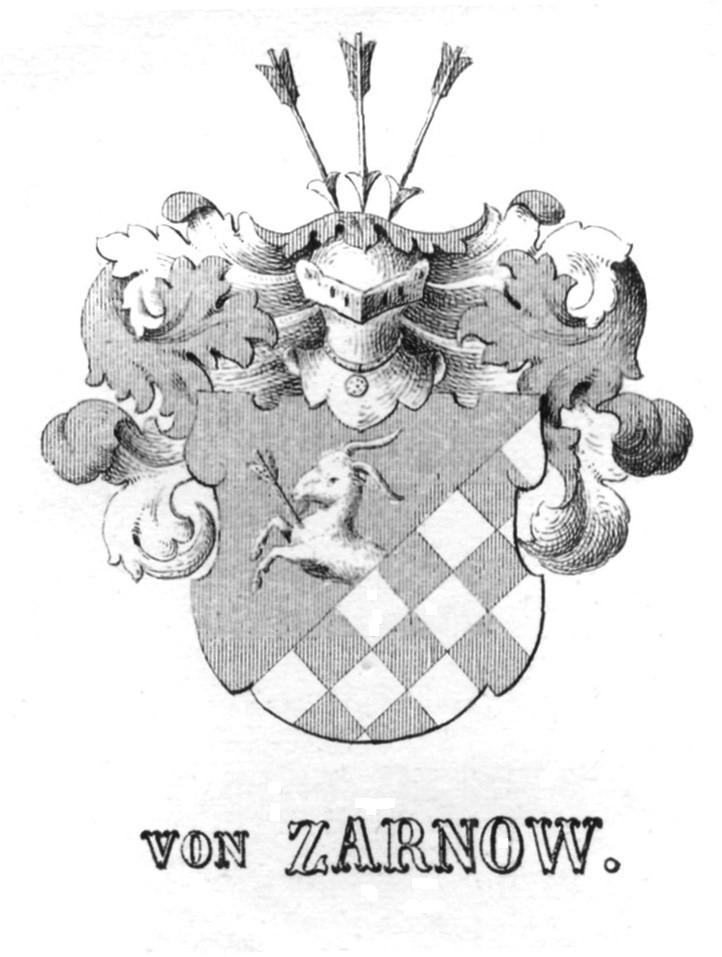 Wappen der Familie von Zarnow.